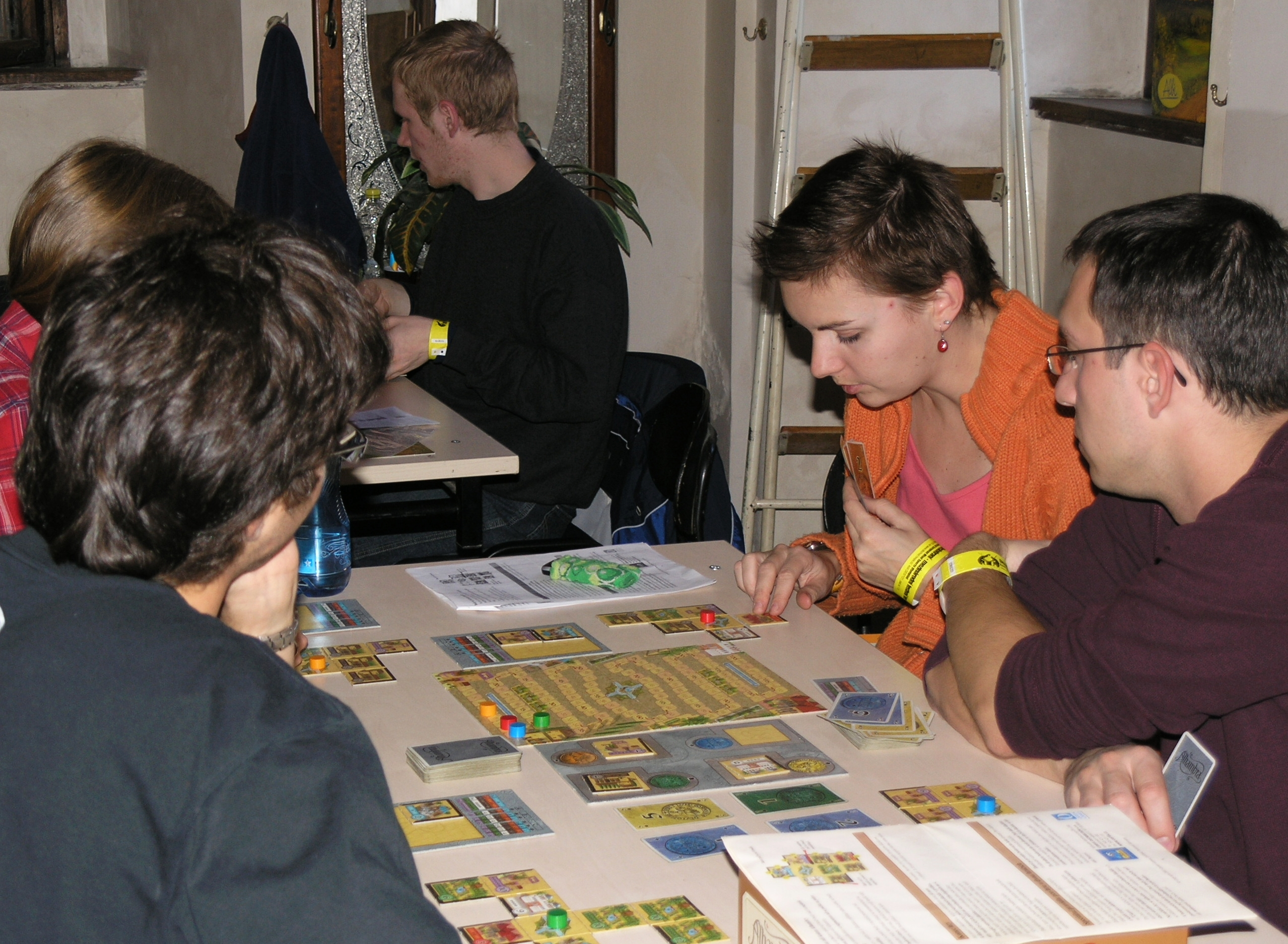 Deskohraní 2008